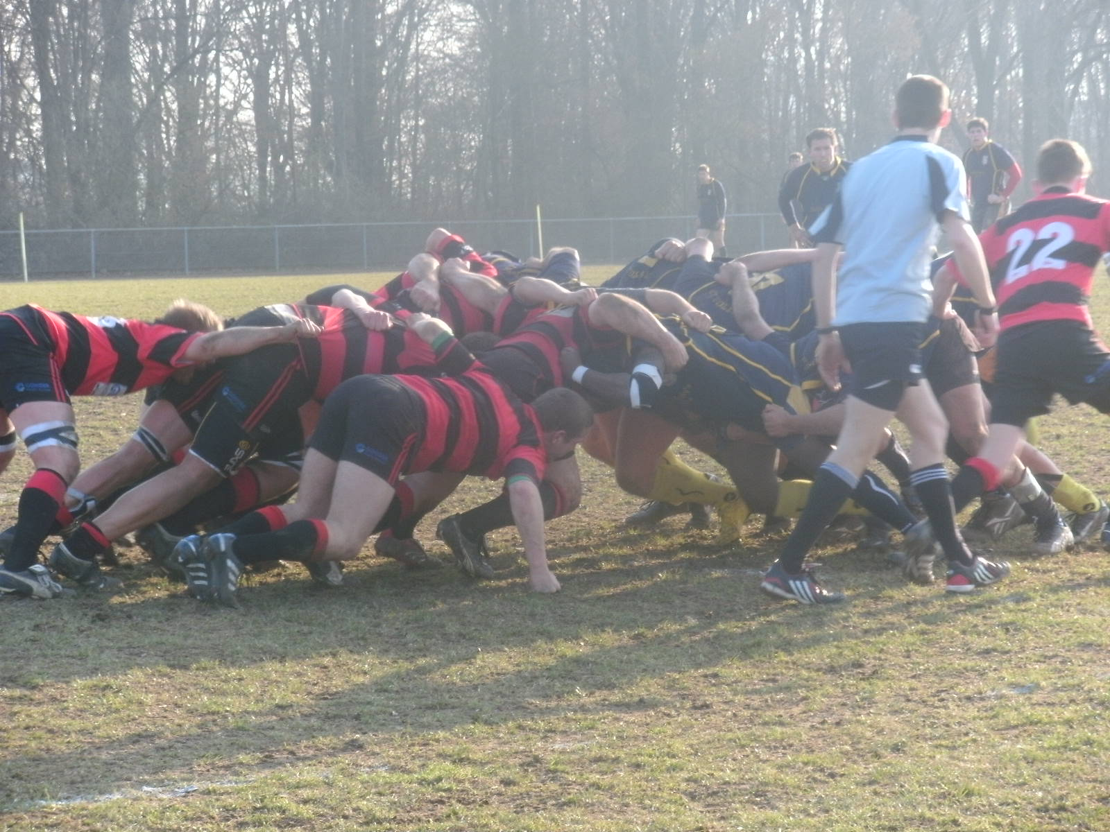 Spielszene aus einem Rugby-Ligaspiel zwischen Stuttgarter RC (blaue Trikots) gegen SC 1880 Frankfurt II (schwarz-rote Trikots) im Stadion "Hohe Eiche" am Bopser in Stuttgart